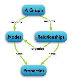 Монгол: График шинж чанарын бүтцийн элэмент